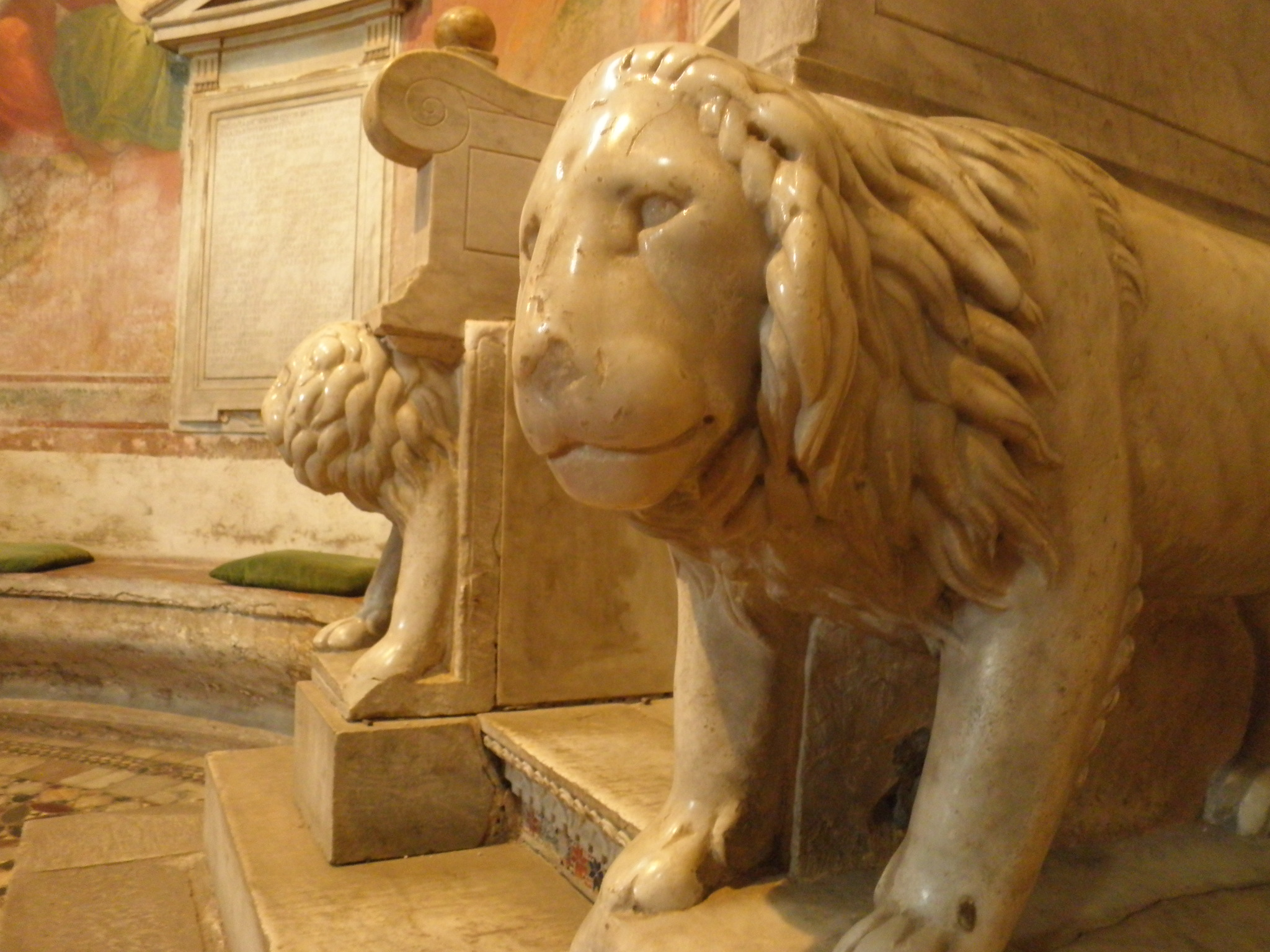 Roma, ss. Nereo e Achilleo, leoni della cattedra episcopale